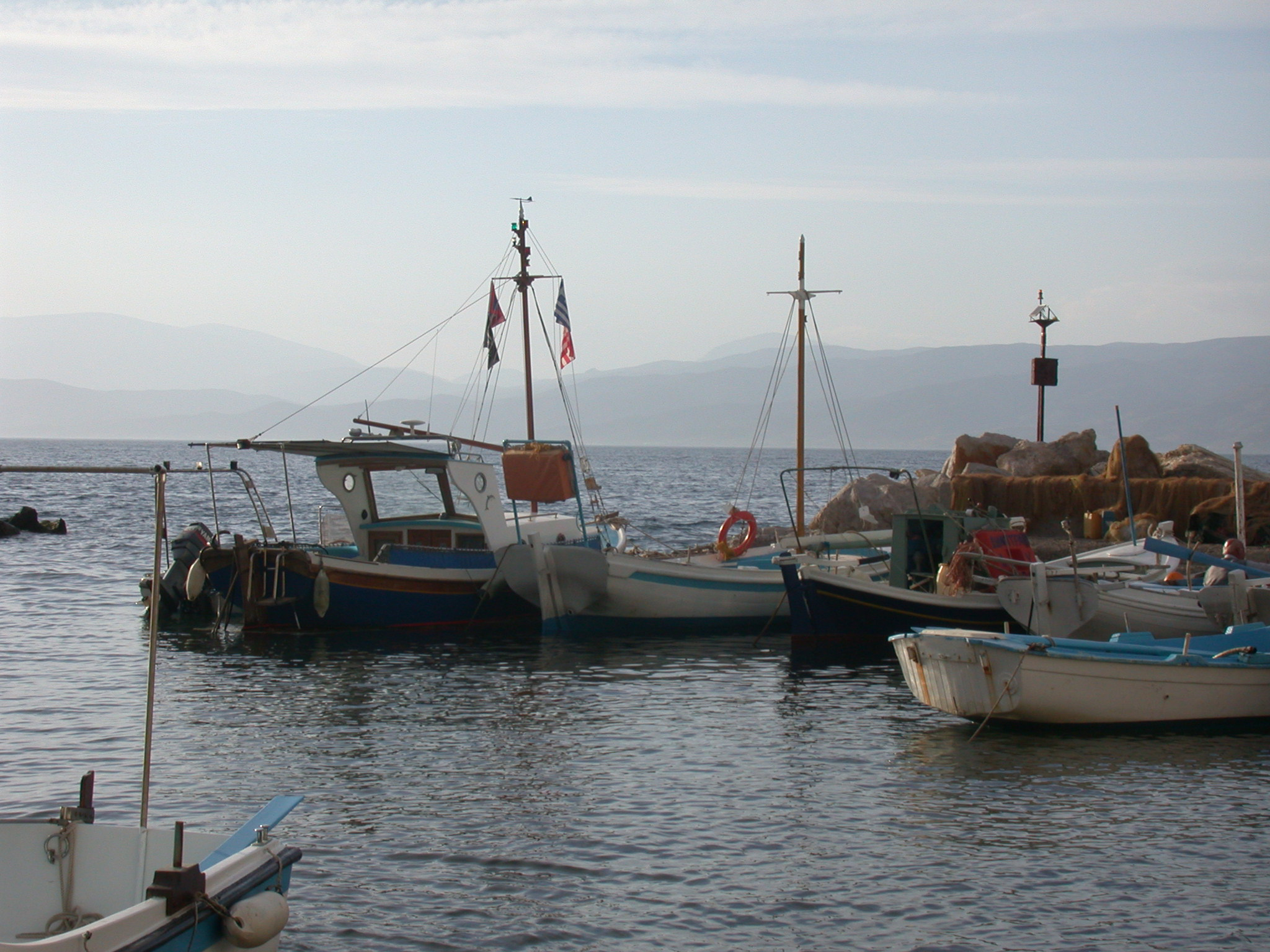 Grecia, isola di Idra, Kalami (presso la cittadina di Idra), porticciolo.